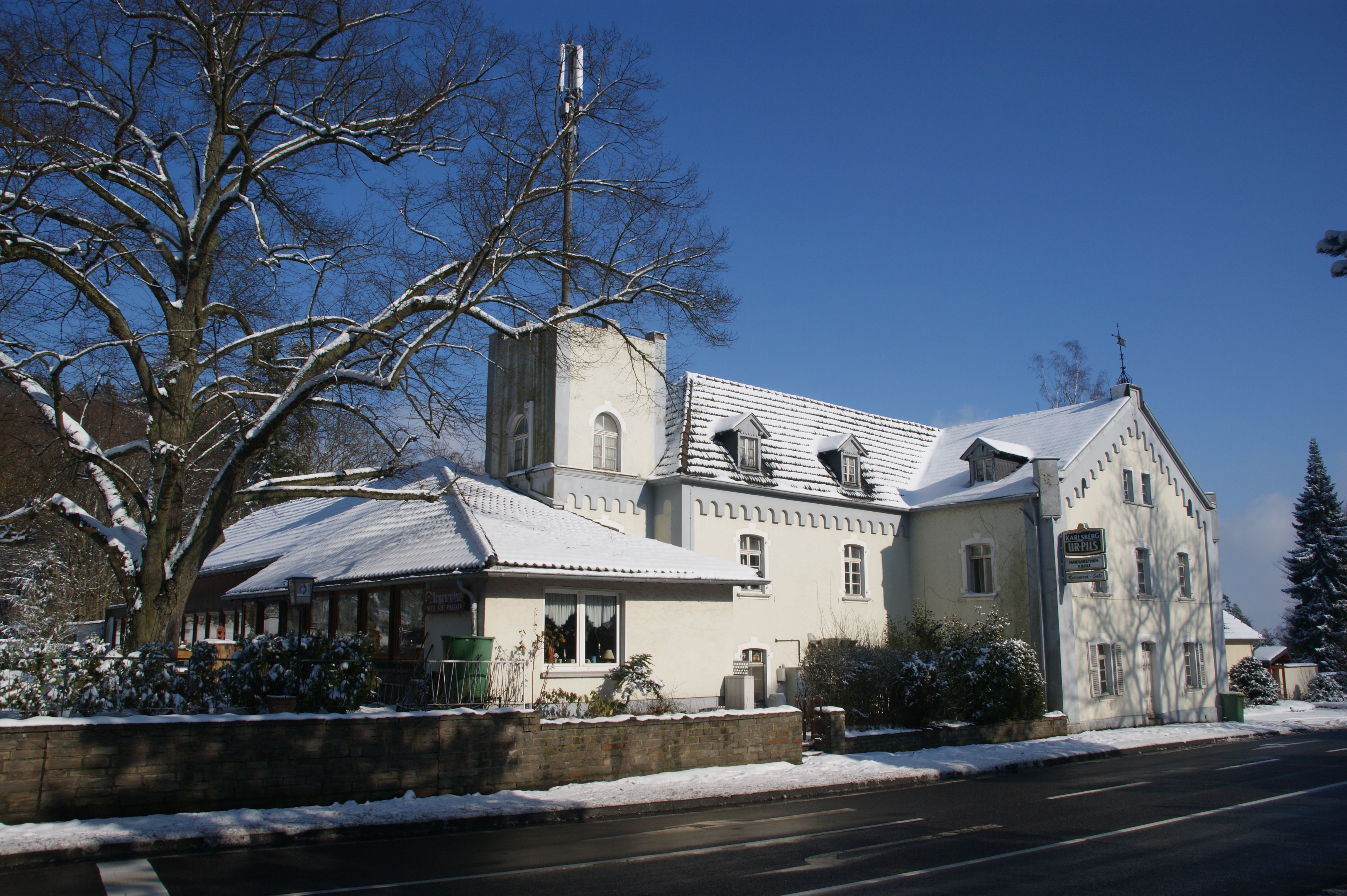 Ehem. Hotel Margarethenkreuz auf der Margarethenhöhe, Ittenbach